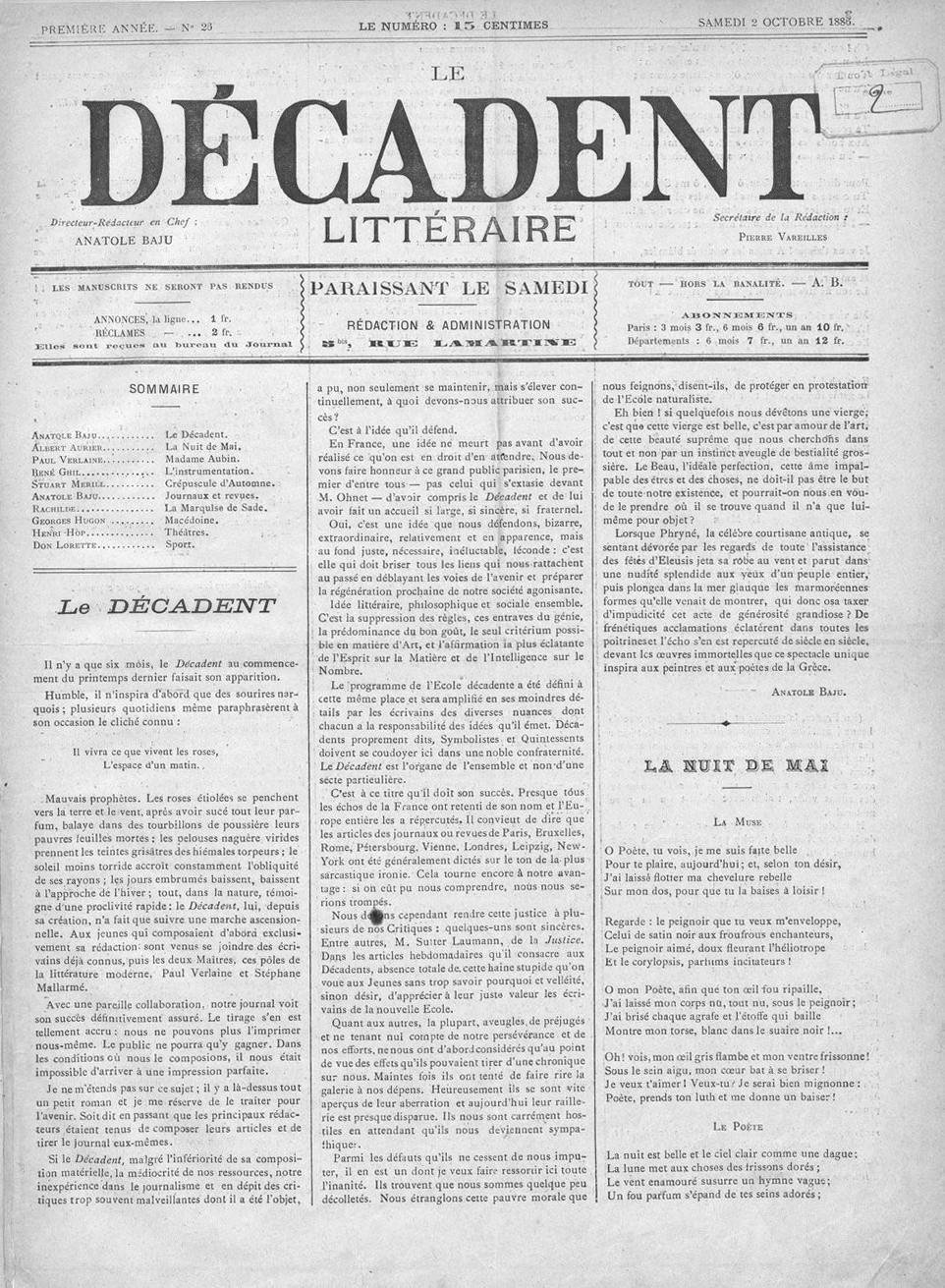 Hebdomadaire littéraire Le Décadent, 2 octobre 1886, n°26